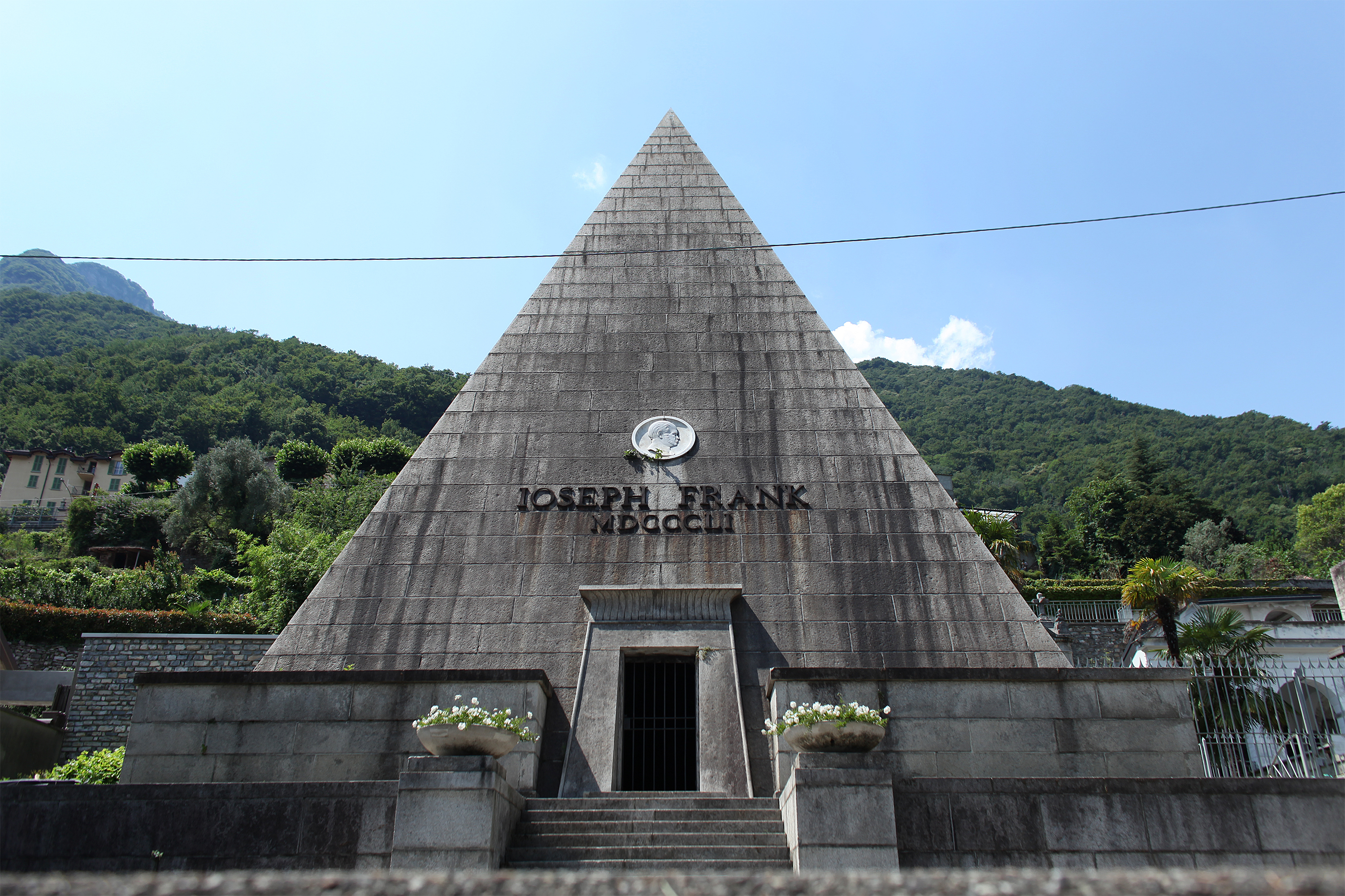 Piramide sepolcrale del dott. Jospeh Frank presso il cimitero di Laglio, Como (1851)